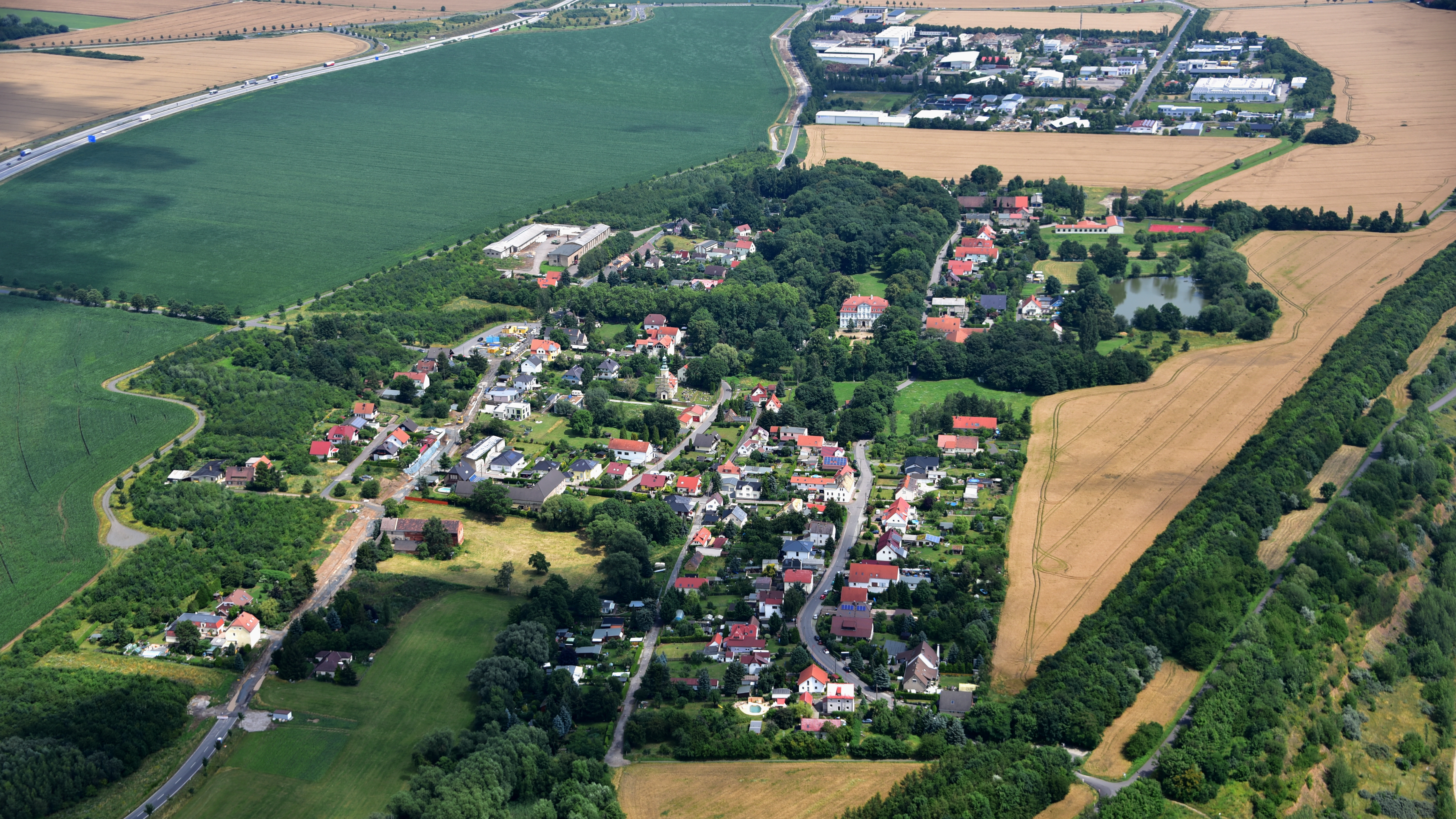 Güldengossa, Luftaufnahme (2017)